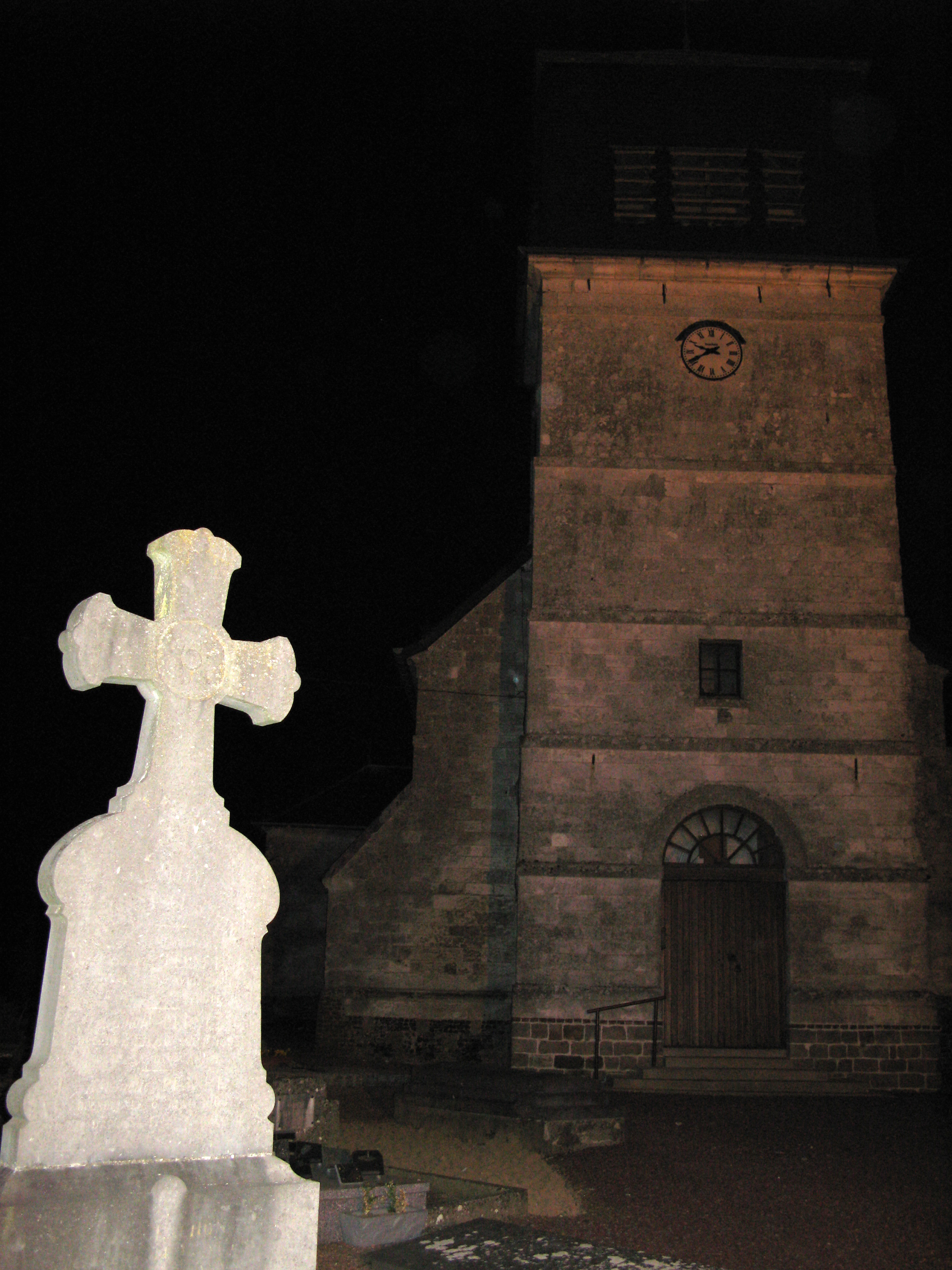 Bouquemaison (Somme, France) - L'église est dans le cimetière. (La lumière étant alors parfaitement insuffisante, je me suis improvisé, selon mon habitude, un éclairage de secours, certes insuffisant : voiture approchée au plus près de la grille d'entrée du cimetière et ... pleins phares ! ...)